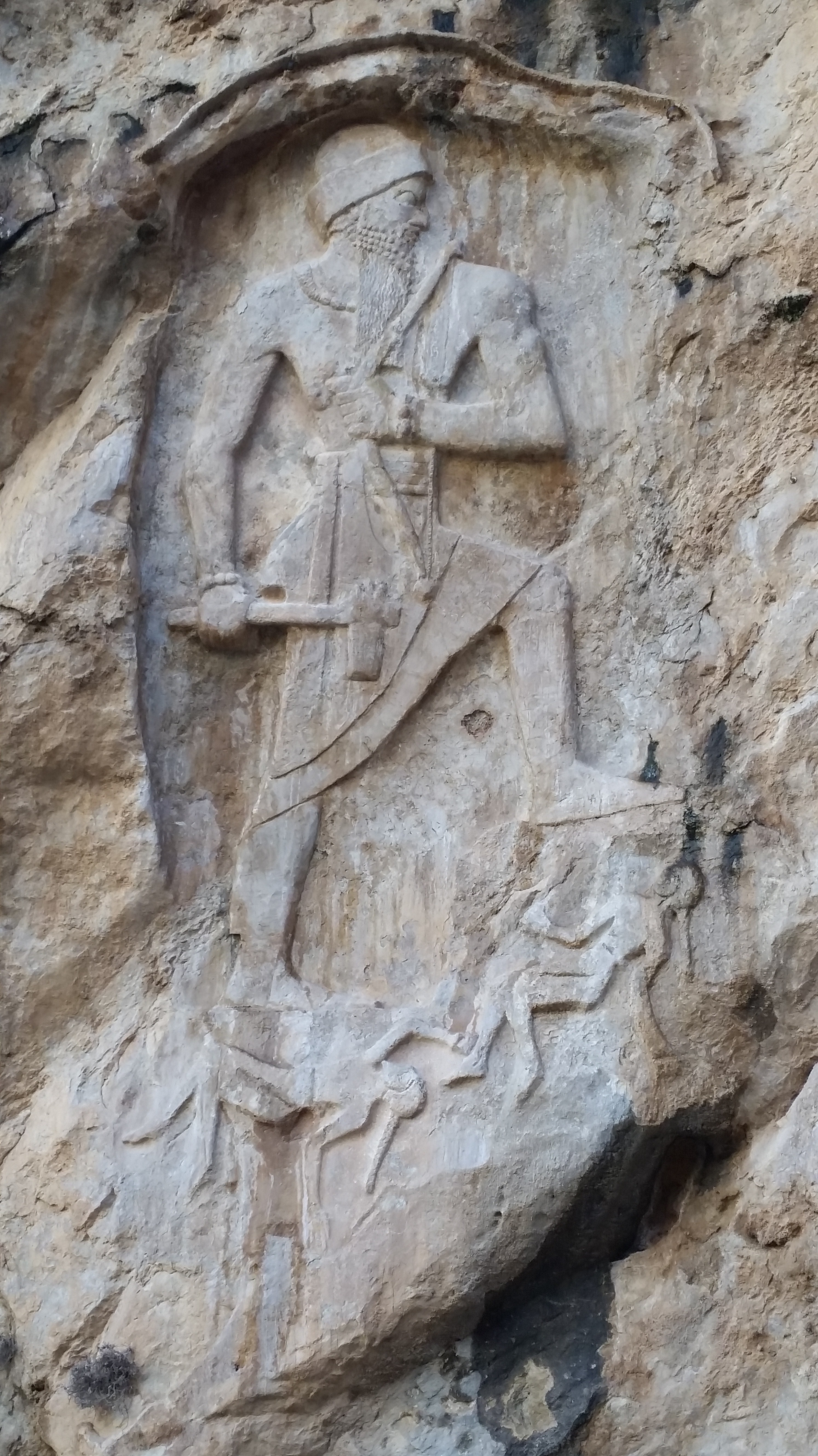 مسلة نارام سین في محافضة السلیمانية